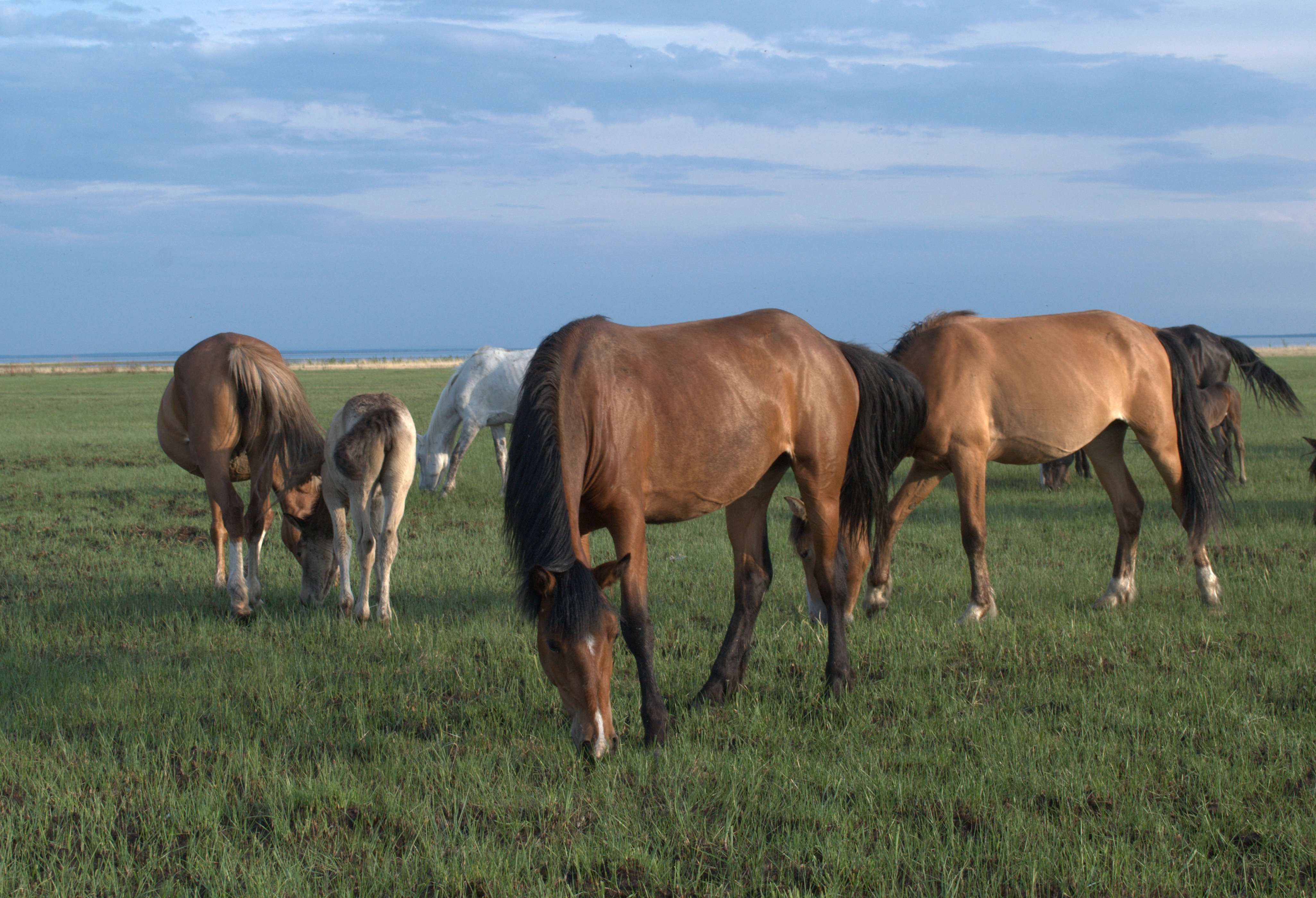 В окрестностях Большой Еравны (озера). Еравнинский район, Бурятия. Забайкалье